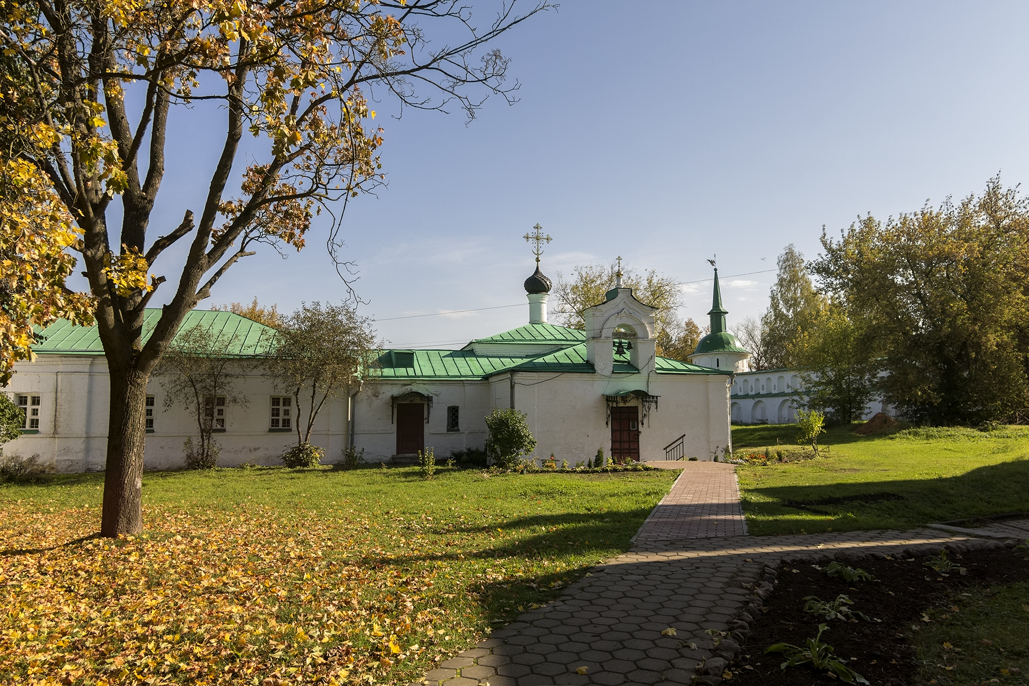 церковь Сретения Господня с больничным корпусом: Музейный проезд, 20, Александров, Александровский район, Владимирская область